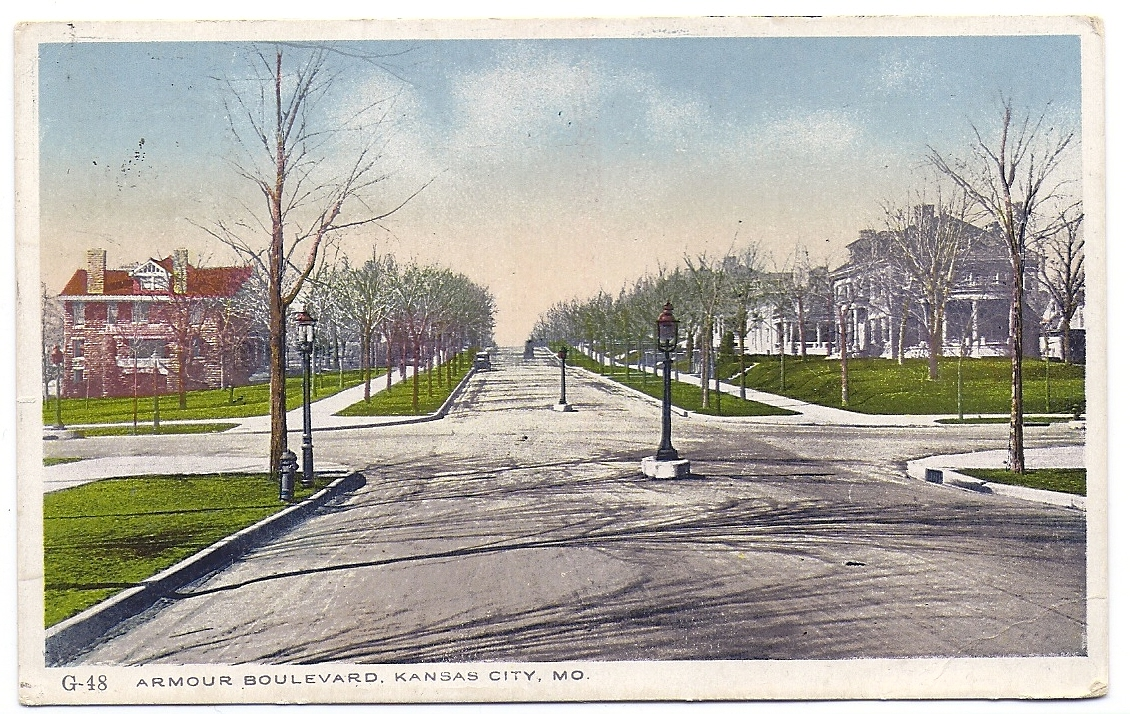 ARMOUR BOULEVARD, KANSAS CITY, MD N0. G-48